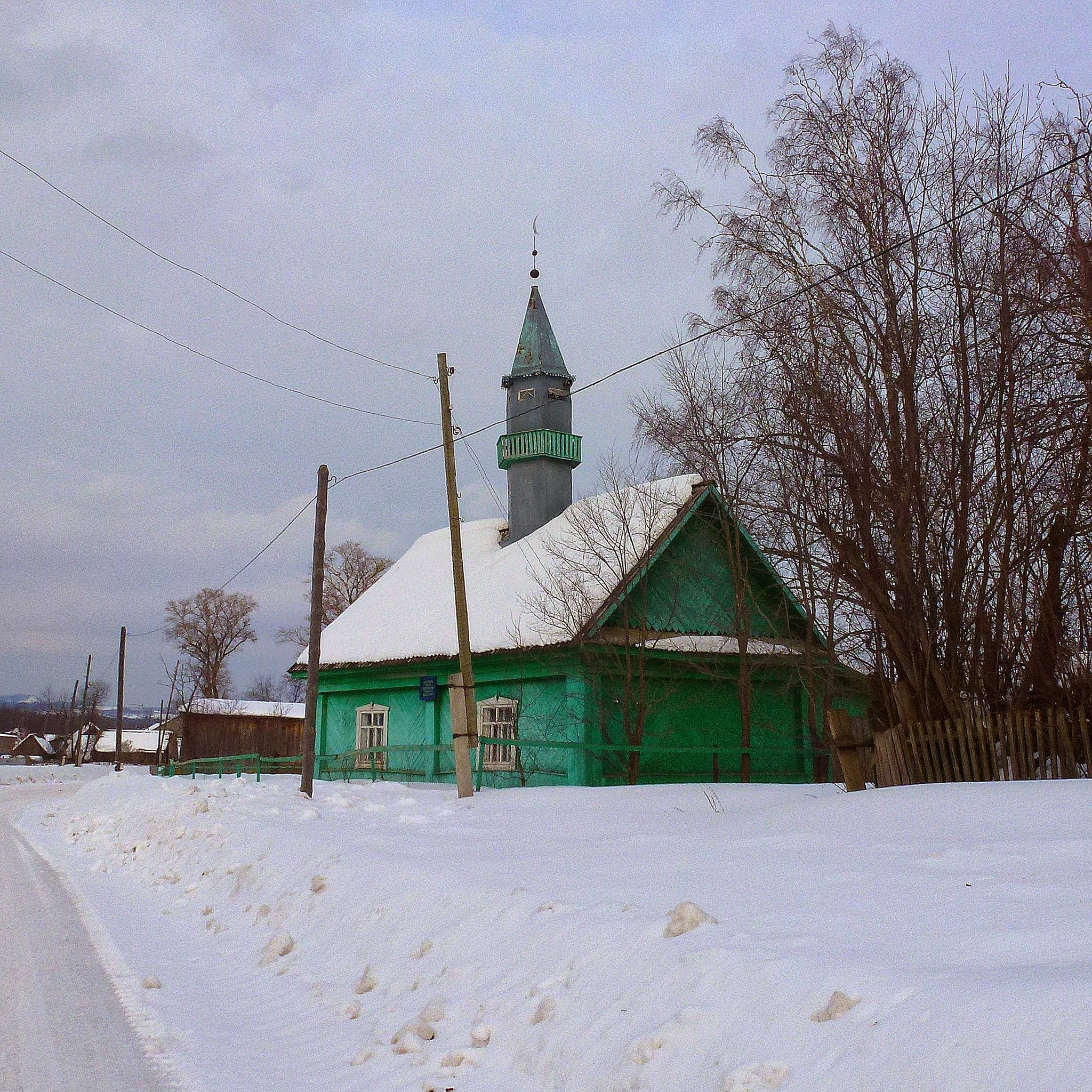 Мечеть. Константиновка - Кучтэнти